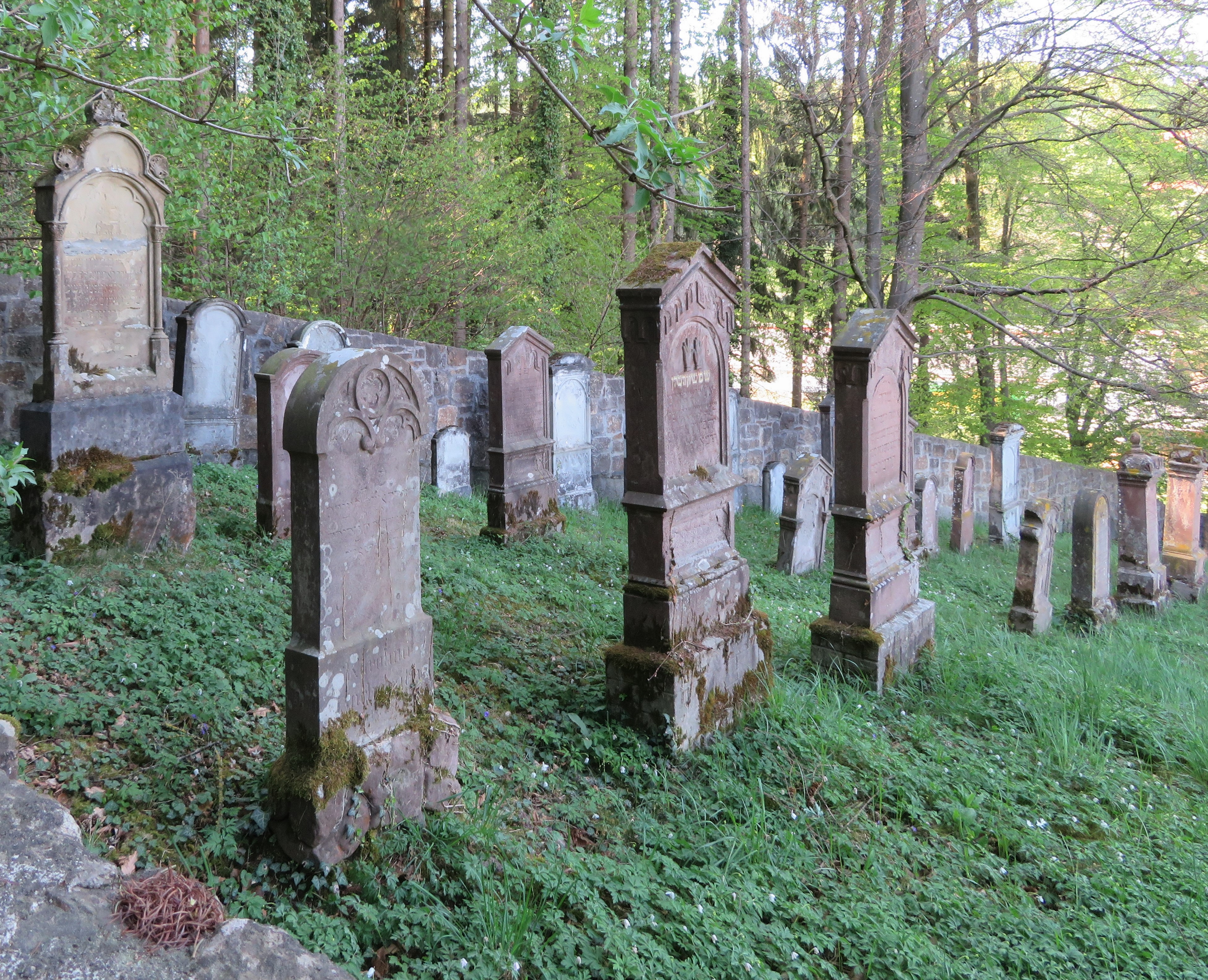 Detail Jüdischer Friedhof Osterberg, Landkreis Neu-Ulm, Schwaben, Bayern